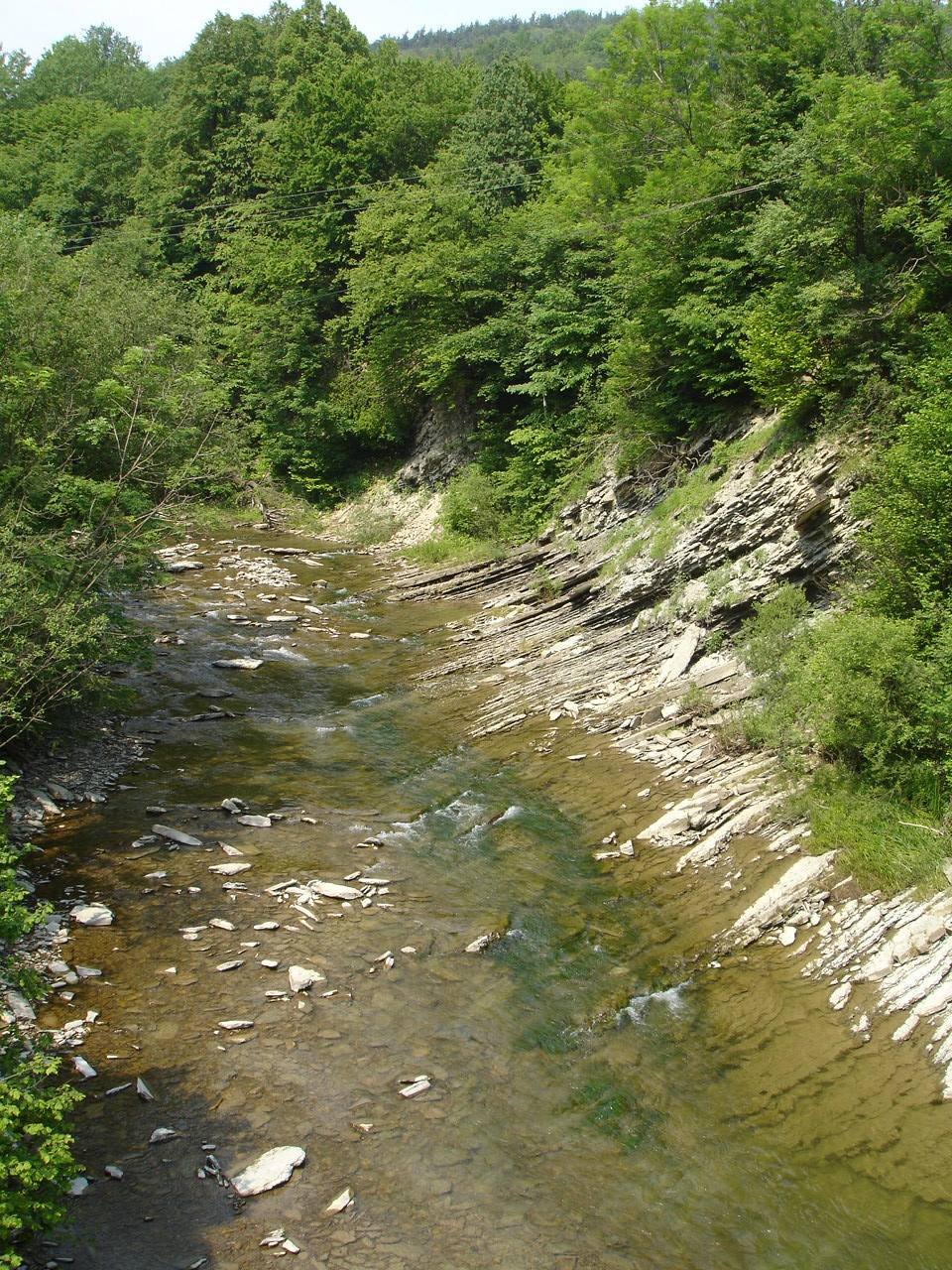 rzeka Wisłok widziana z mostu w Pulawach Dolnych